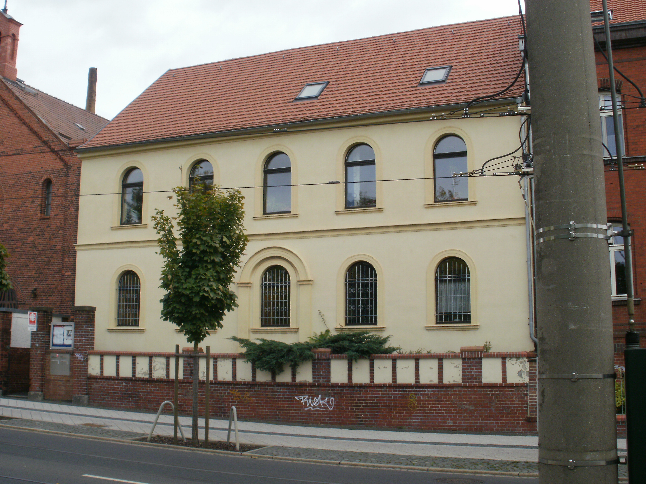 Straßenansicht des Pfarrhauses der Christuskirche